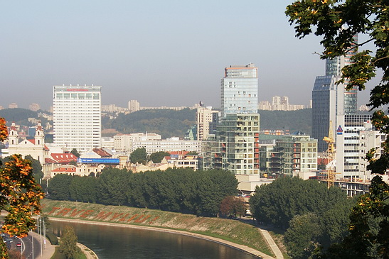 Šnipiškės view